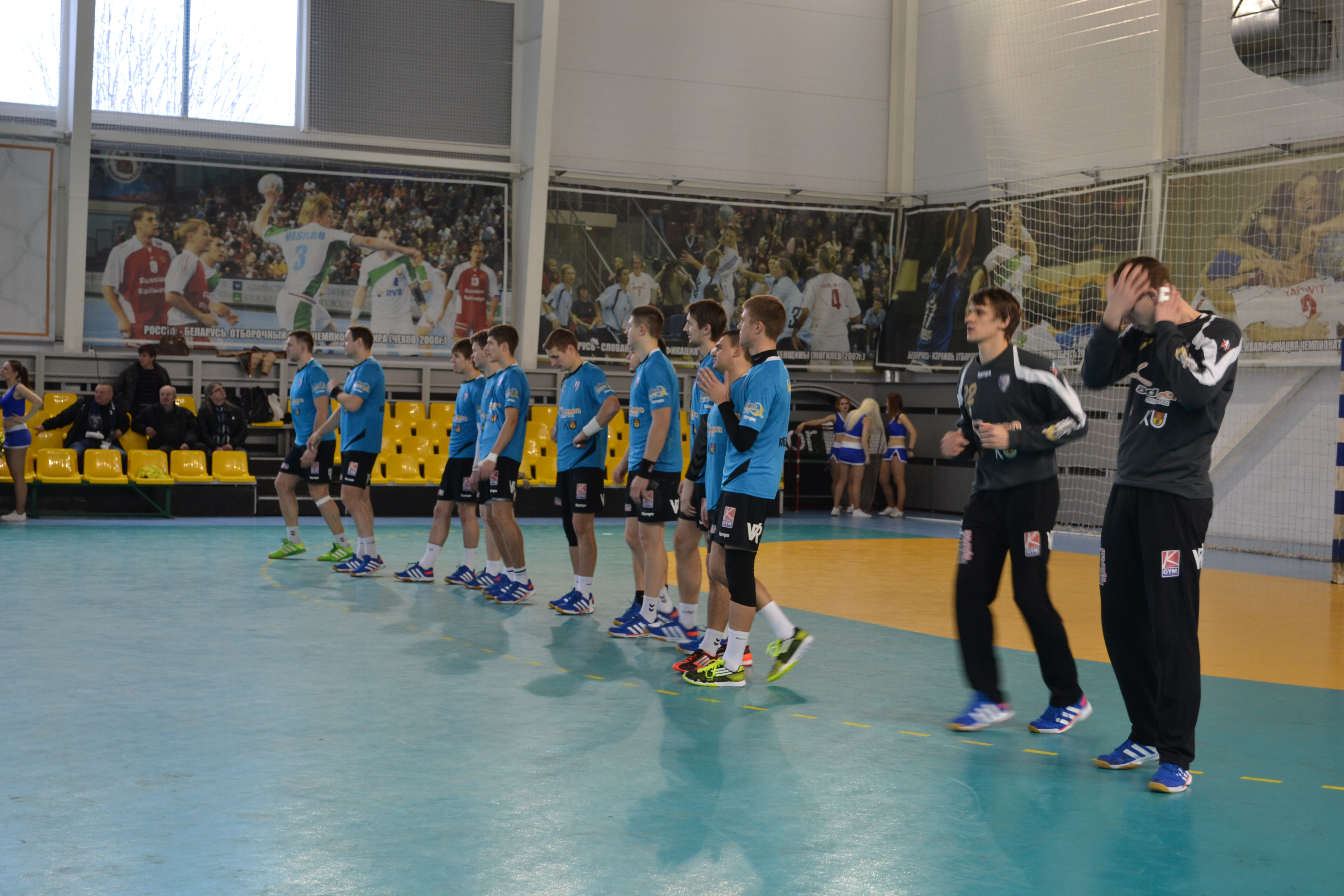 Беларуская (тарашкевіца): Матч Балтыйскай лігі «Віцязь-РДВАР» (Беларусь) — «Жэмайтыяс Драгунас» (Летува). 8 сьнежня 2013